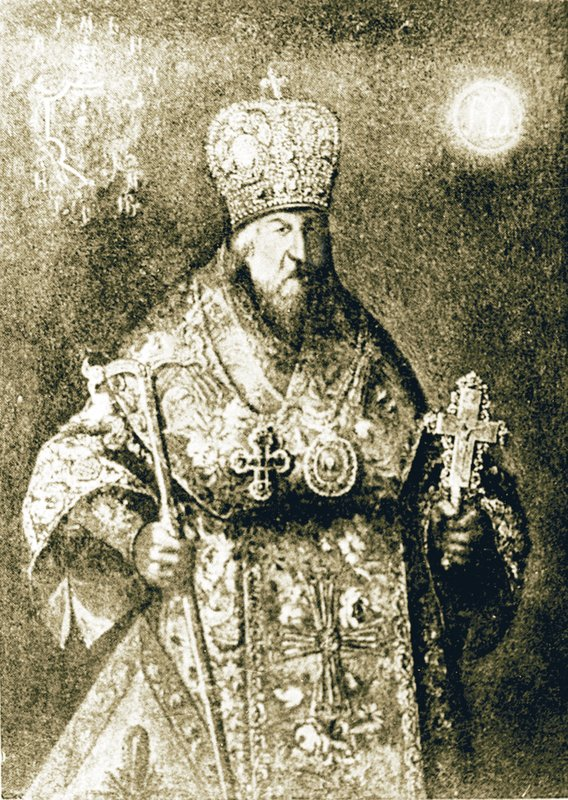 Свт. Иоанн (Максимович), митр. Тобольский и всея Сибири. Фотография с парсуны кон. XVII — нач. XVIII в.